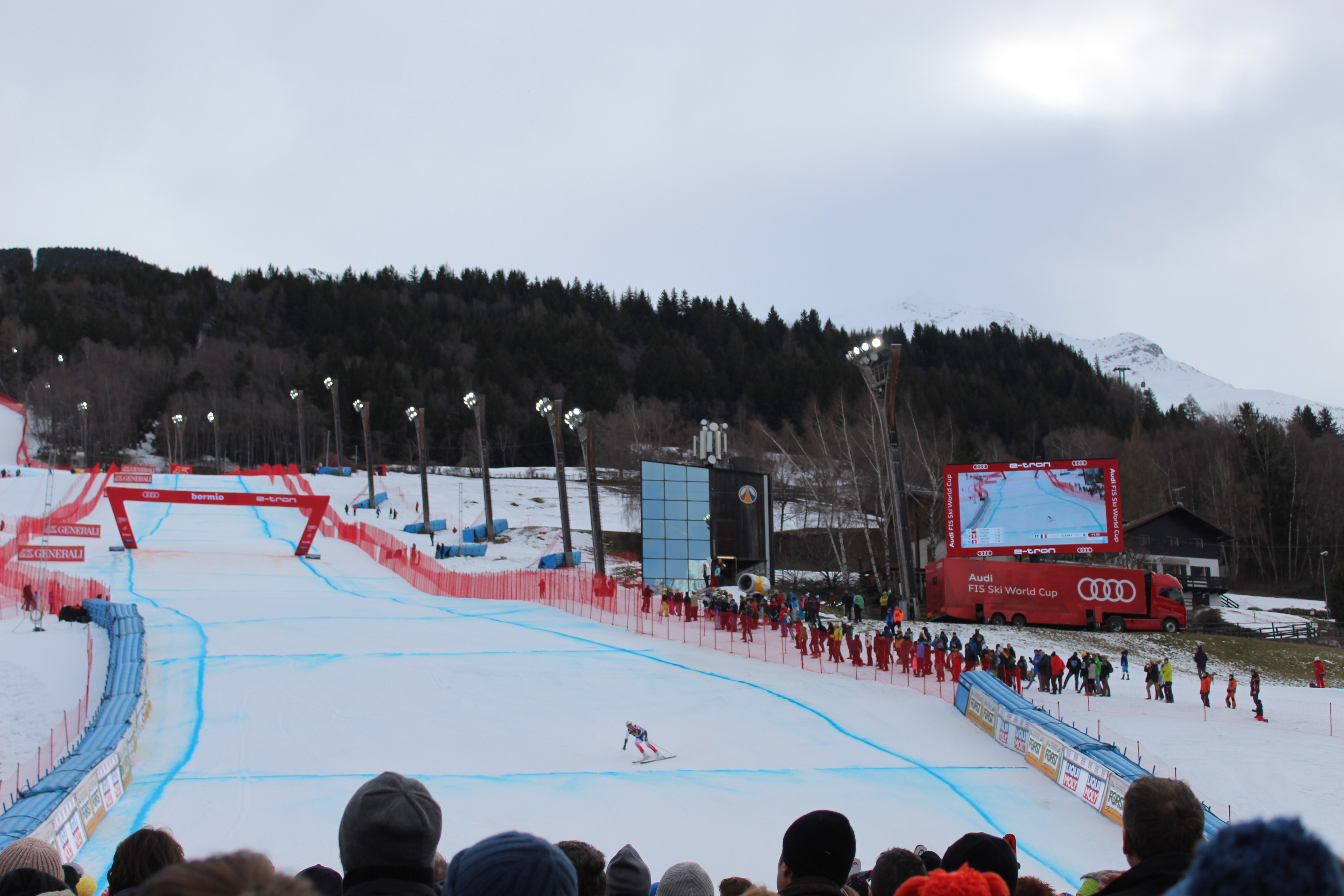 Lo sciatore francese Johan Clarey al traguardo della Pista Stelvio di Bormio, durante la discesa libera del 27 dicembre 2019, valida per la Coppa del Mondo di sci 2019-2020.